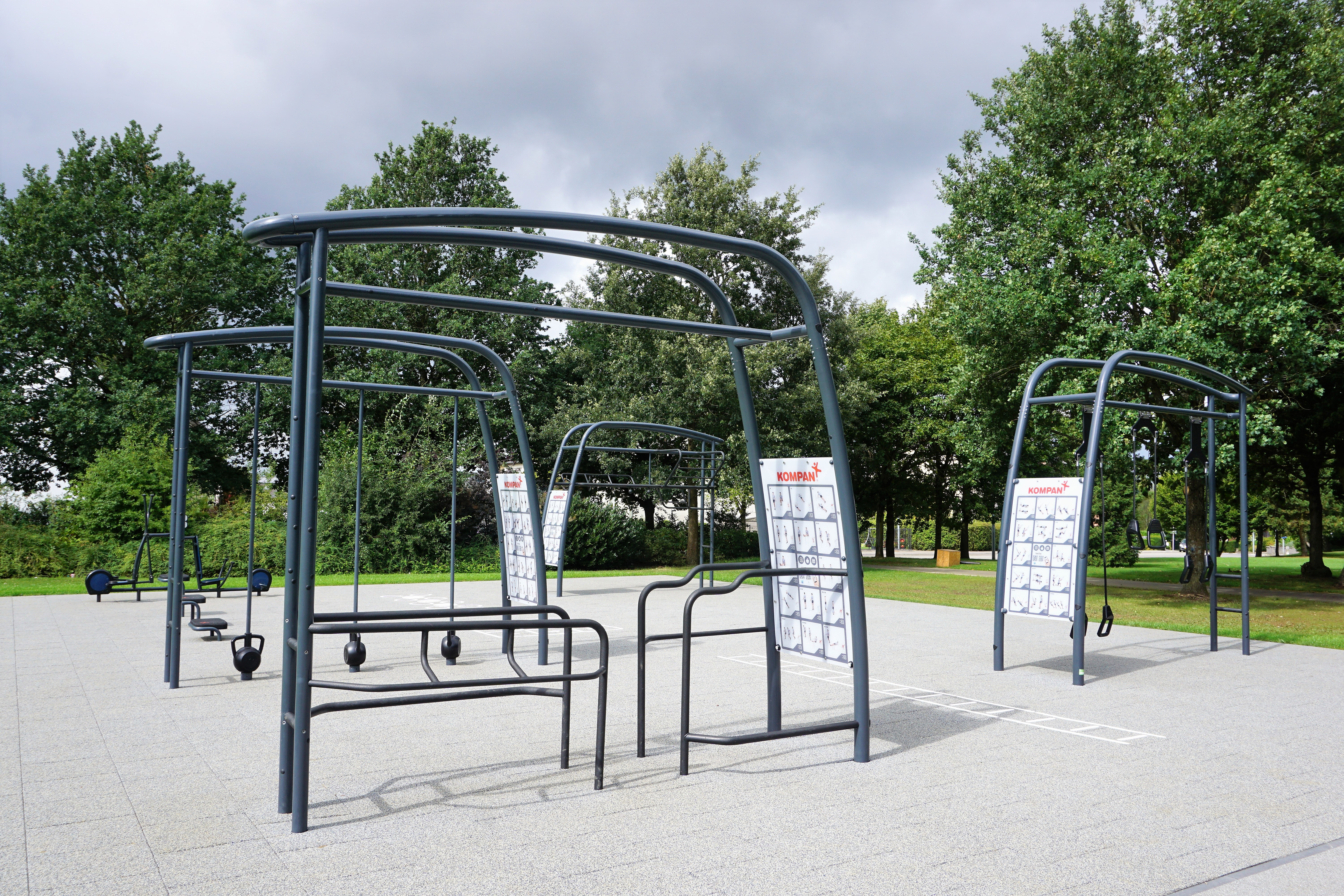 Parc Kaltreis à Bonnevoie entièrement réaménagé en 2017. Installation de callisthénie